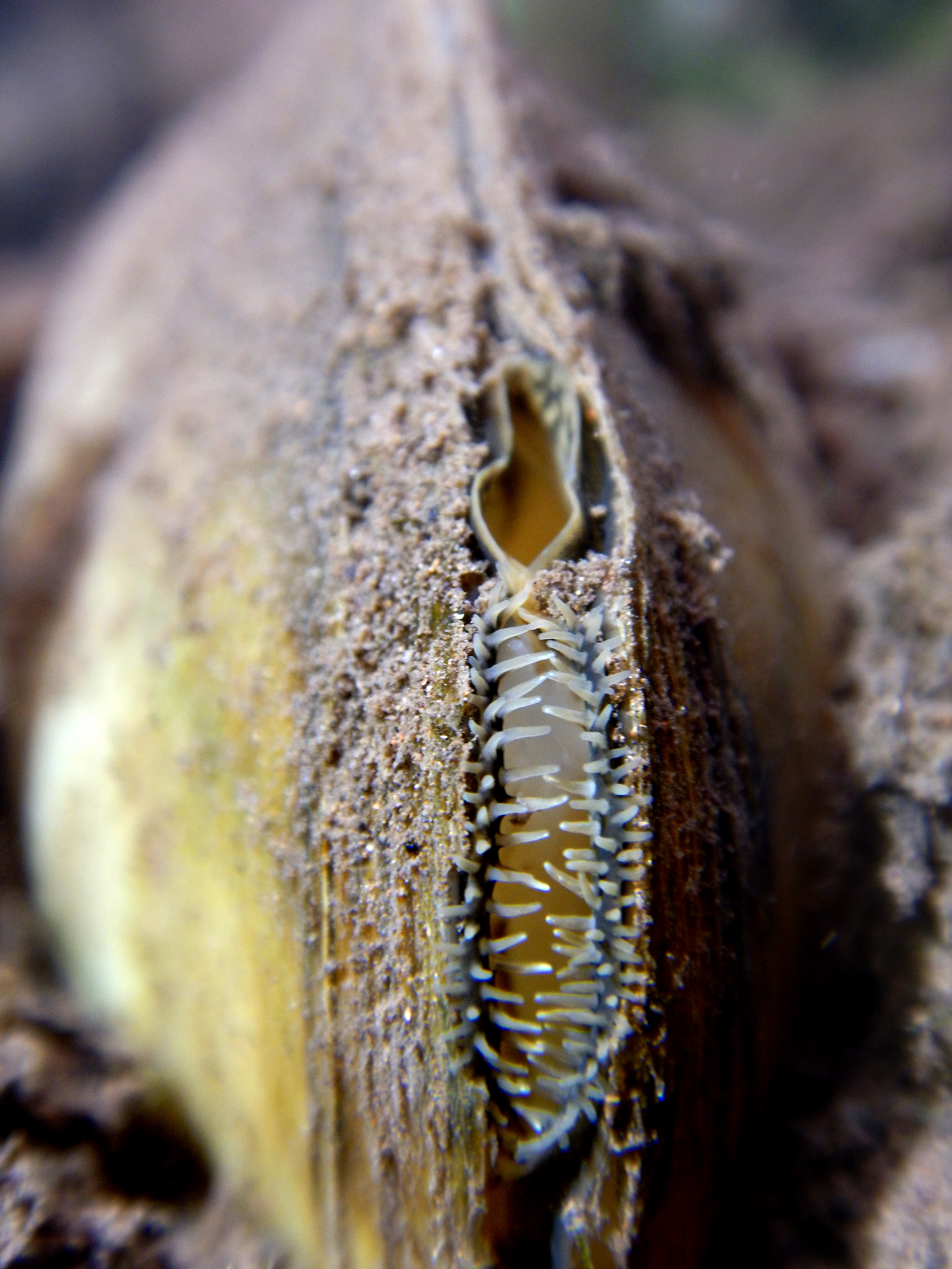 Mollusque bivalve de la famille des Unionidae, ici observé dans un ruisseau étroit reliant deux pièces d'eau d'un jardin public du Nord de la France (fin juillet 2014). Les siphons inhalant et exhalant sont bien visibles. Longueur de la coquille : 8-9 cm